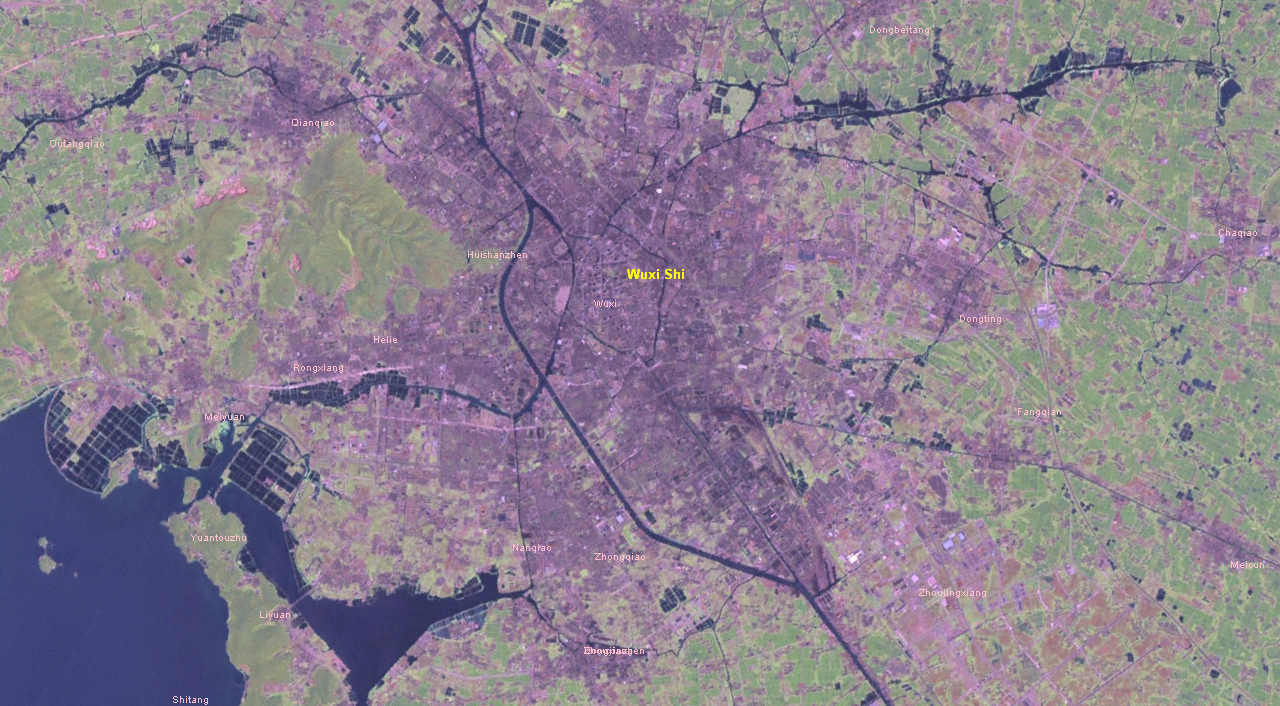 无锡市卫星图像,使用NASA提供的免费软件World Wind获得。